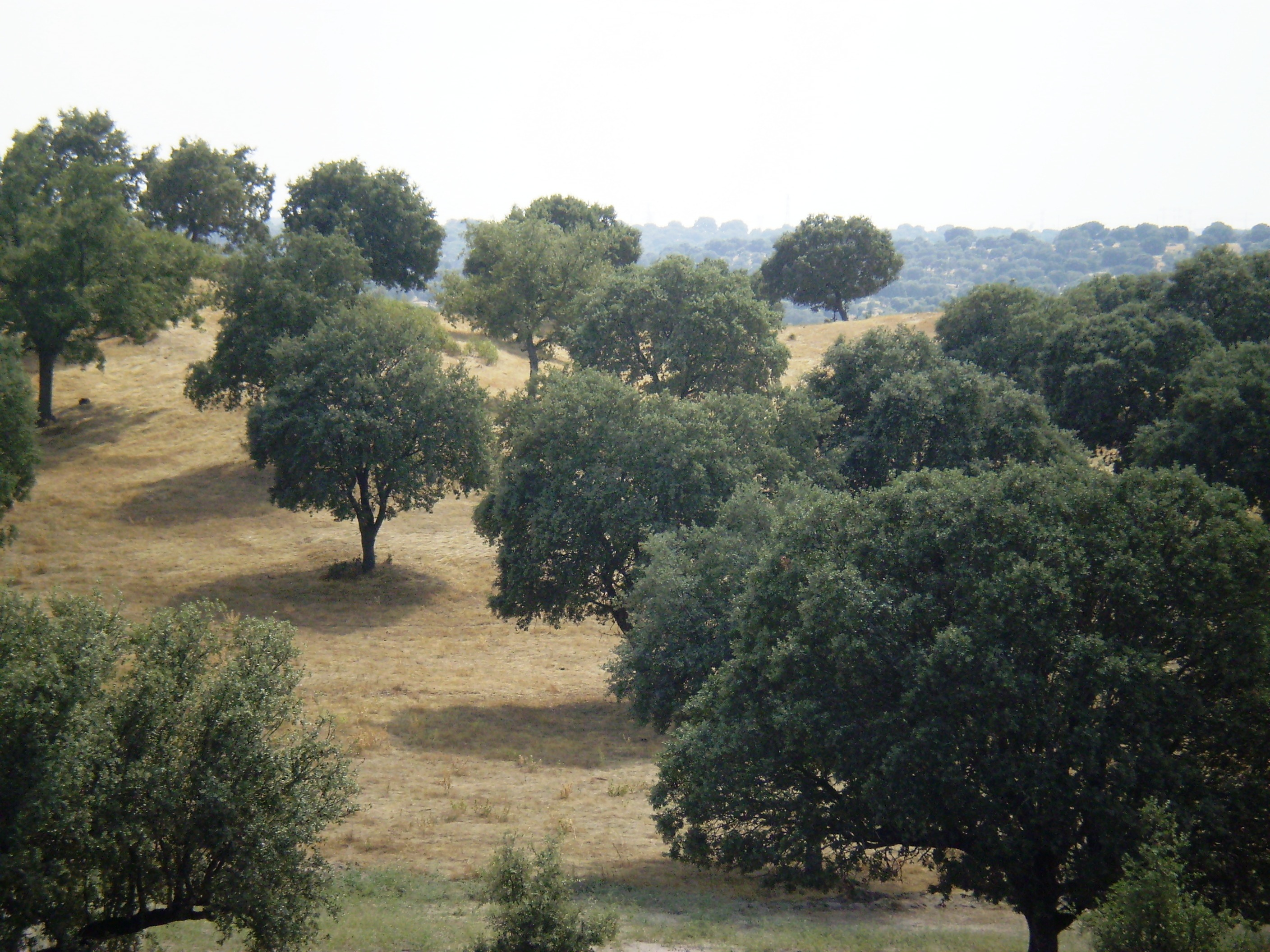 Soto de Viñuelas. Madrid, Spain